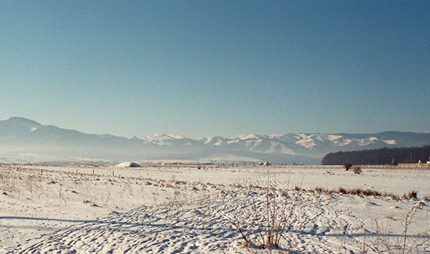 Das Zibinsgebirge - Munţii Cândrel